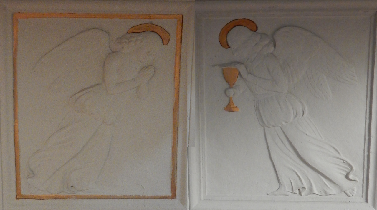 Collage dei due angeli quattrocenteschi presenti ai lati dell'altare, opera della scuola di Mino da Fiesole